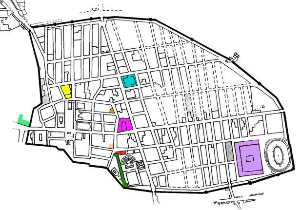 Les bains et les édifices sportifs Thermes suburbaines Thermes du forum Thermes centrales Thermes de Stabies Non renseigné Forum Triangulaire Palestre Samnite Grande Palestre Lupanar.